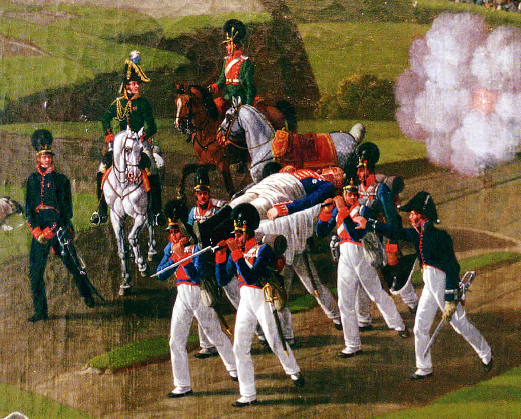 Wilhelm von Kobell (1766–1853): Schlacht bei Polozk (weißrussisch Полацк) am 18. August 1812, 1813. Öl auf Leinwand, 205,0 x 324,4 cm. WV 1016. Residenzmuseum, München. Detail: Der durch einen Musketenschuss in den Unterleib tödlich verwundete Kommandant der 19. Division, General der Infanterie Bernhard Erasmus von Deroy (* 1743), wird von Soldaten des 9. Infanterieregiments auf ihren Musketen getragen und von einem Arzt (rechts vorn) begleitet.